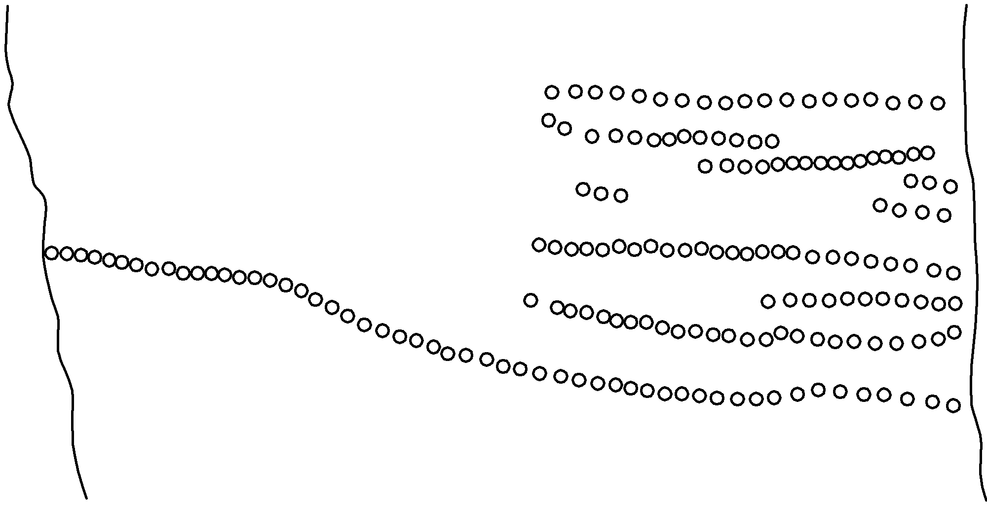 Skizze der Lochreihen auf dem Kalenderstein von Mnajdra auf Malta nach Frank Ventura, Michael Hoskin: Temples of Malta, in: Clive Ruggles (Herausgeber), Handbook of Archaeoastronomy and Ethnoastronomy, 7. Juli 2014, Seiten 1421-1430, Springer, New York, ISBN 978-1-4614-6140-1